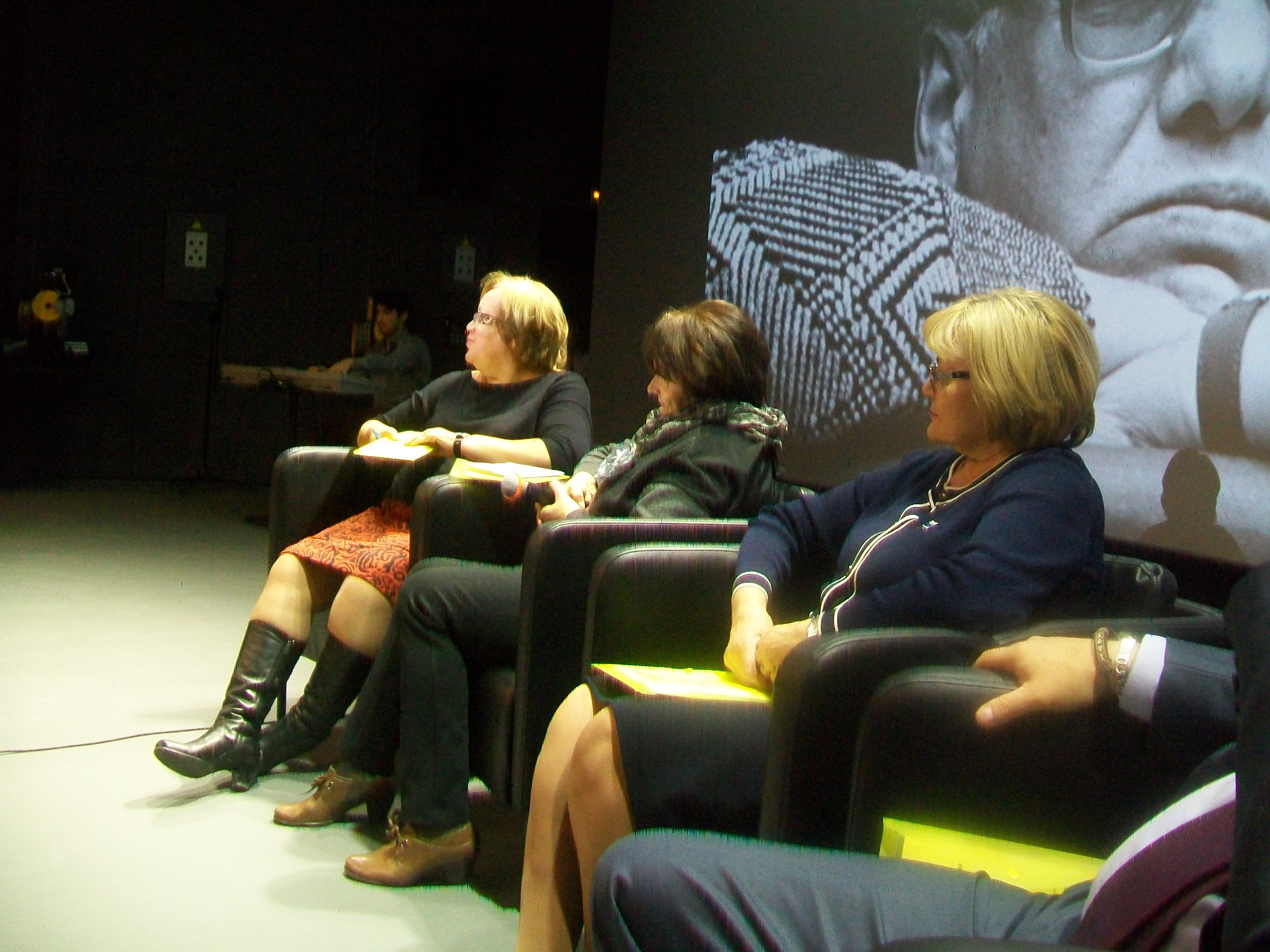 Уполномоченные по правам человека в Пермском крае и Свердловской области Марголина и Мерзлякова в Ельцин-центре (октябрь 2016 года)